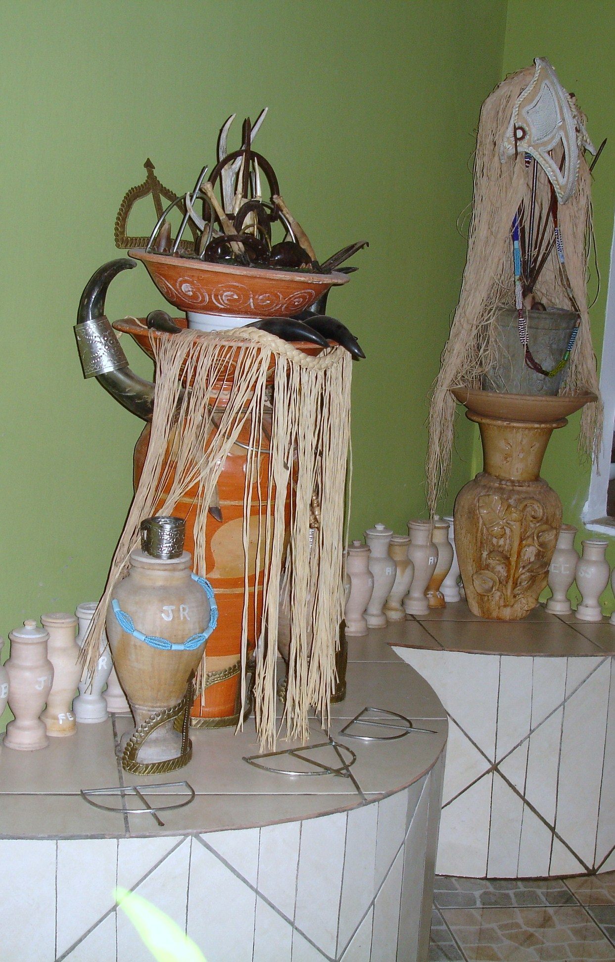 Acentos de Oxossi e Ossaim